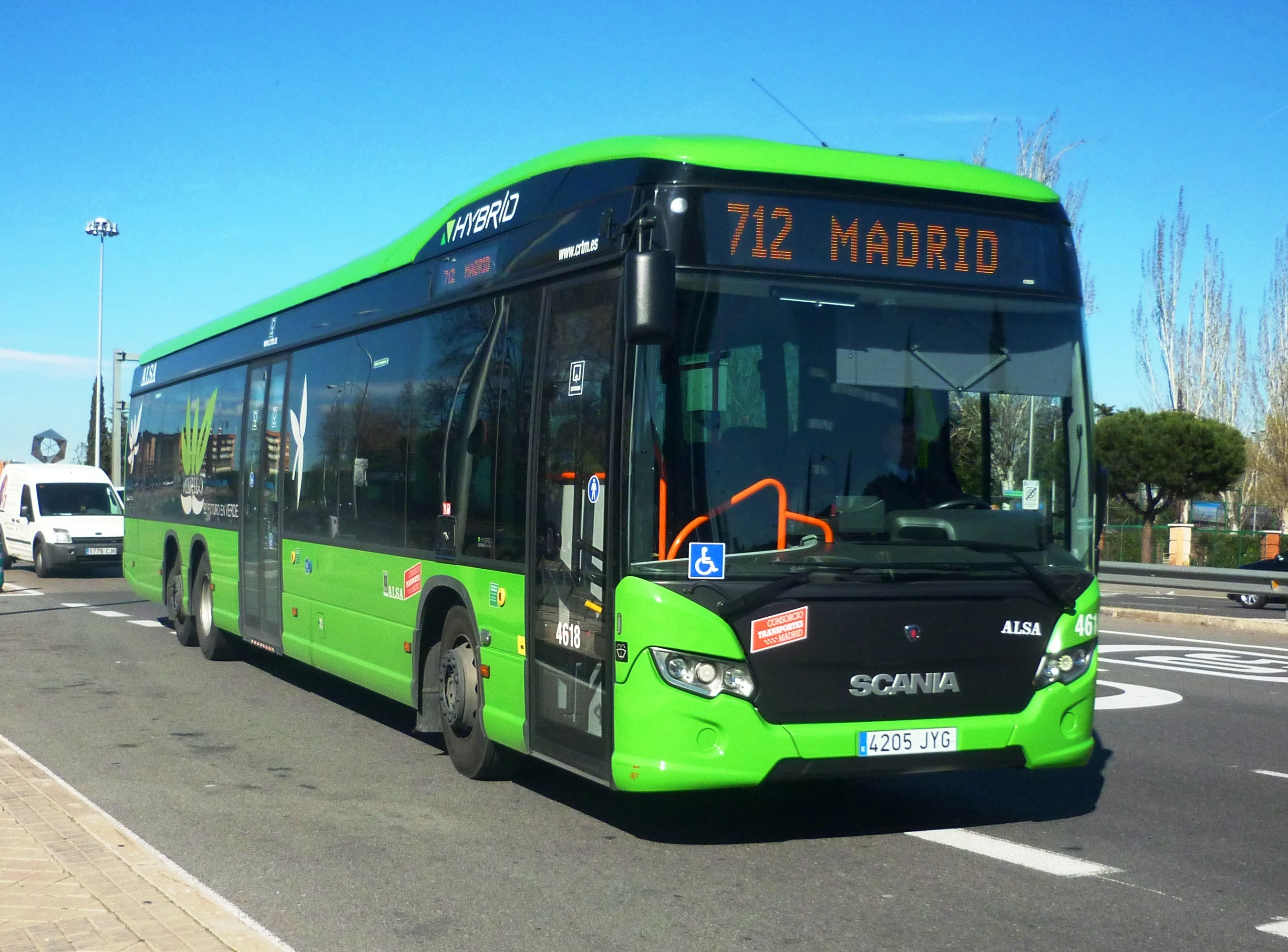 4618_ALSA